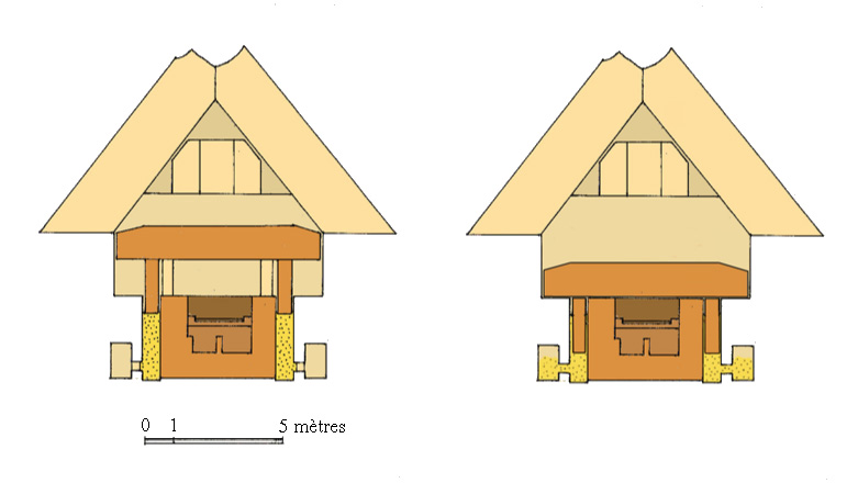 Système de fermeture du caveau des appartements funéraires de la pyramide inachevée de Saqqarah sud